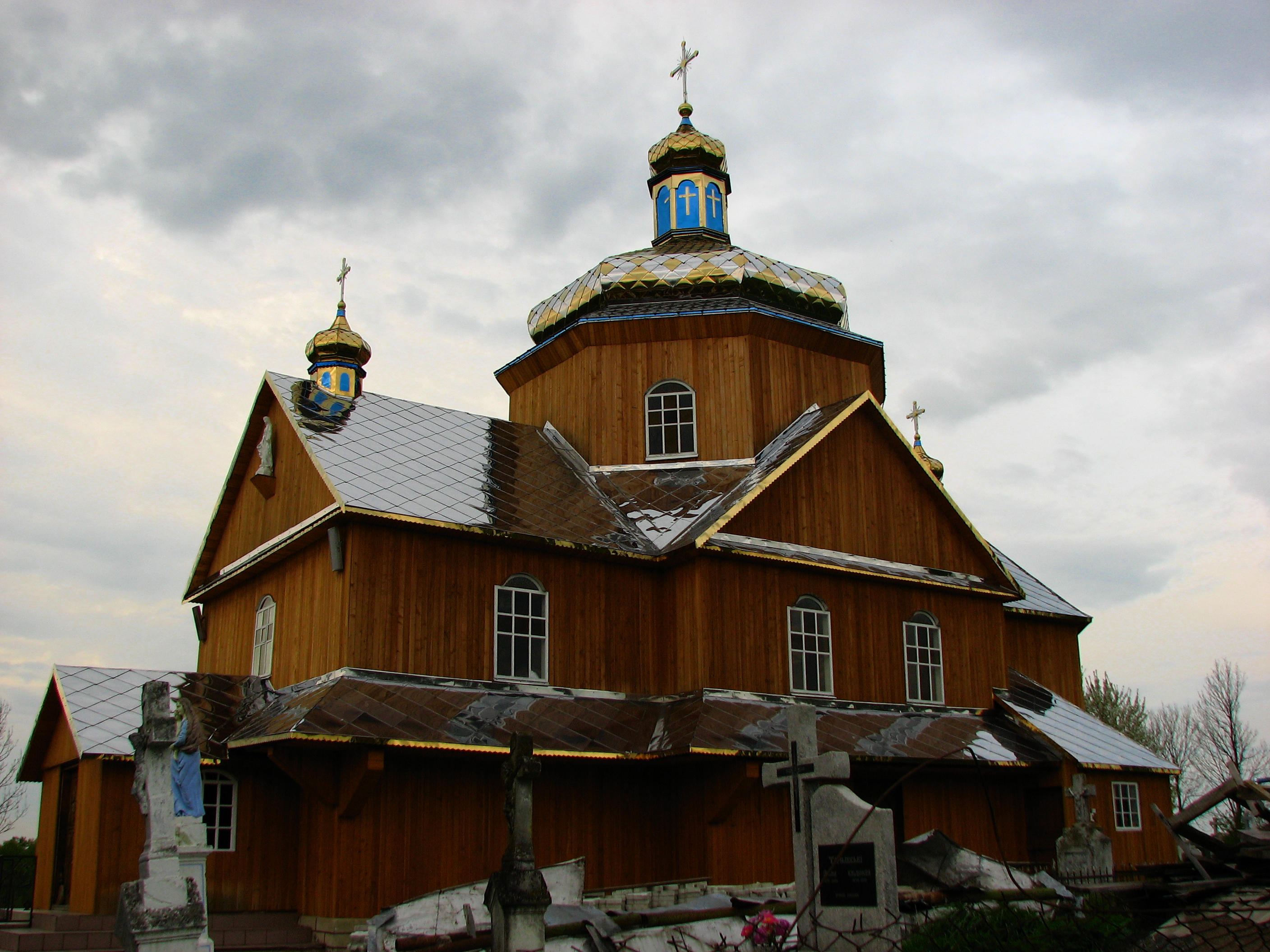 Храм Успення Пресвятої Богородиці УГКЦ.